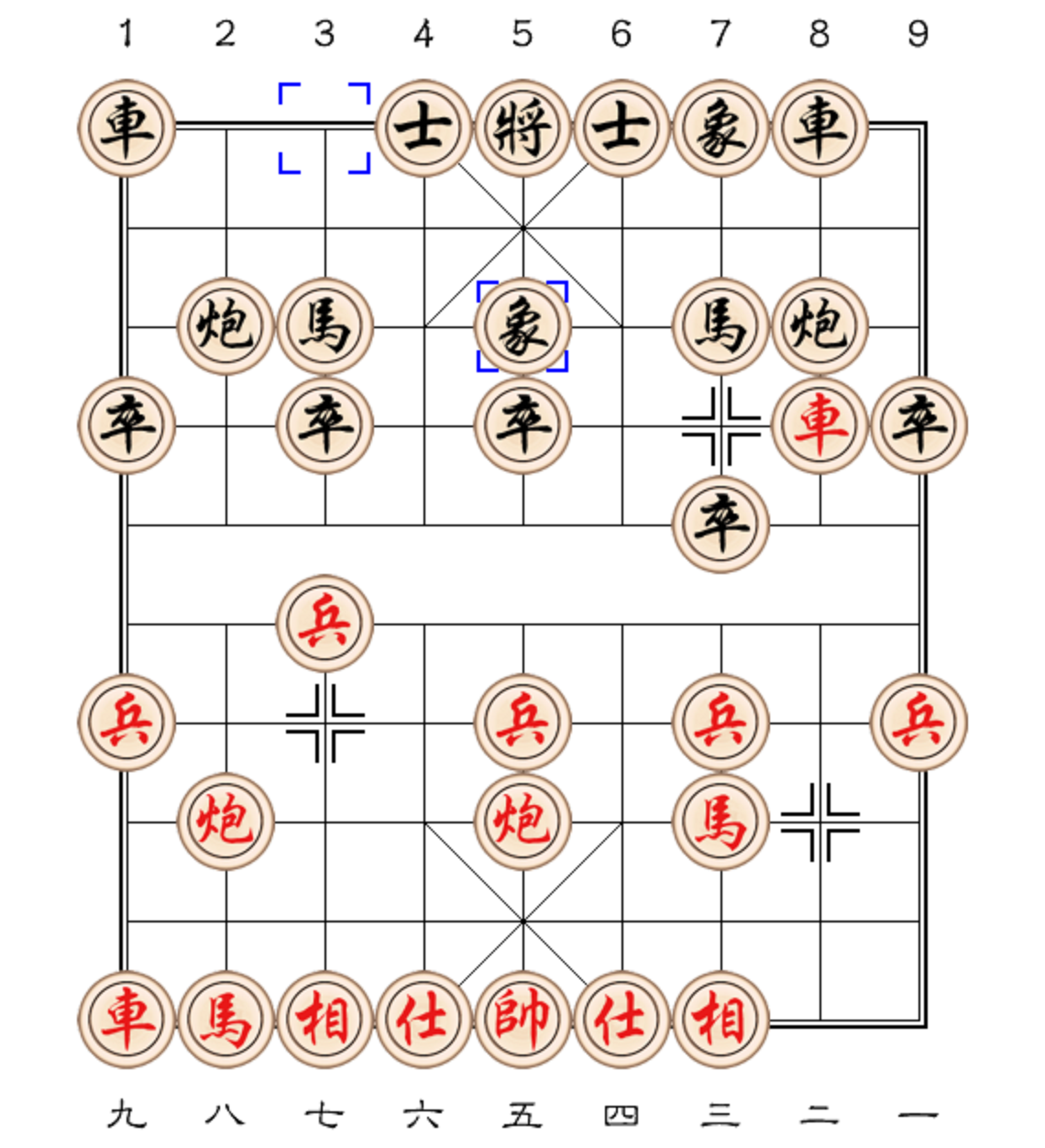 Hữu tượng